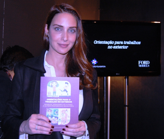 Português do Brasil: Patrícia Barros, modelo e atriz brasileira.